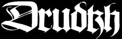 Drudkh logo